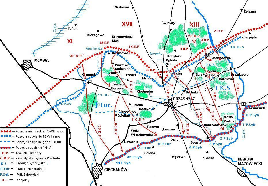 Mapa Bitwy przasnyskiej z 13-14 lipca 1915 roku